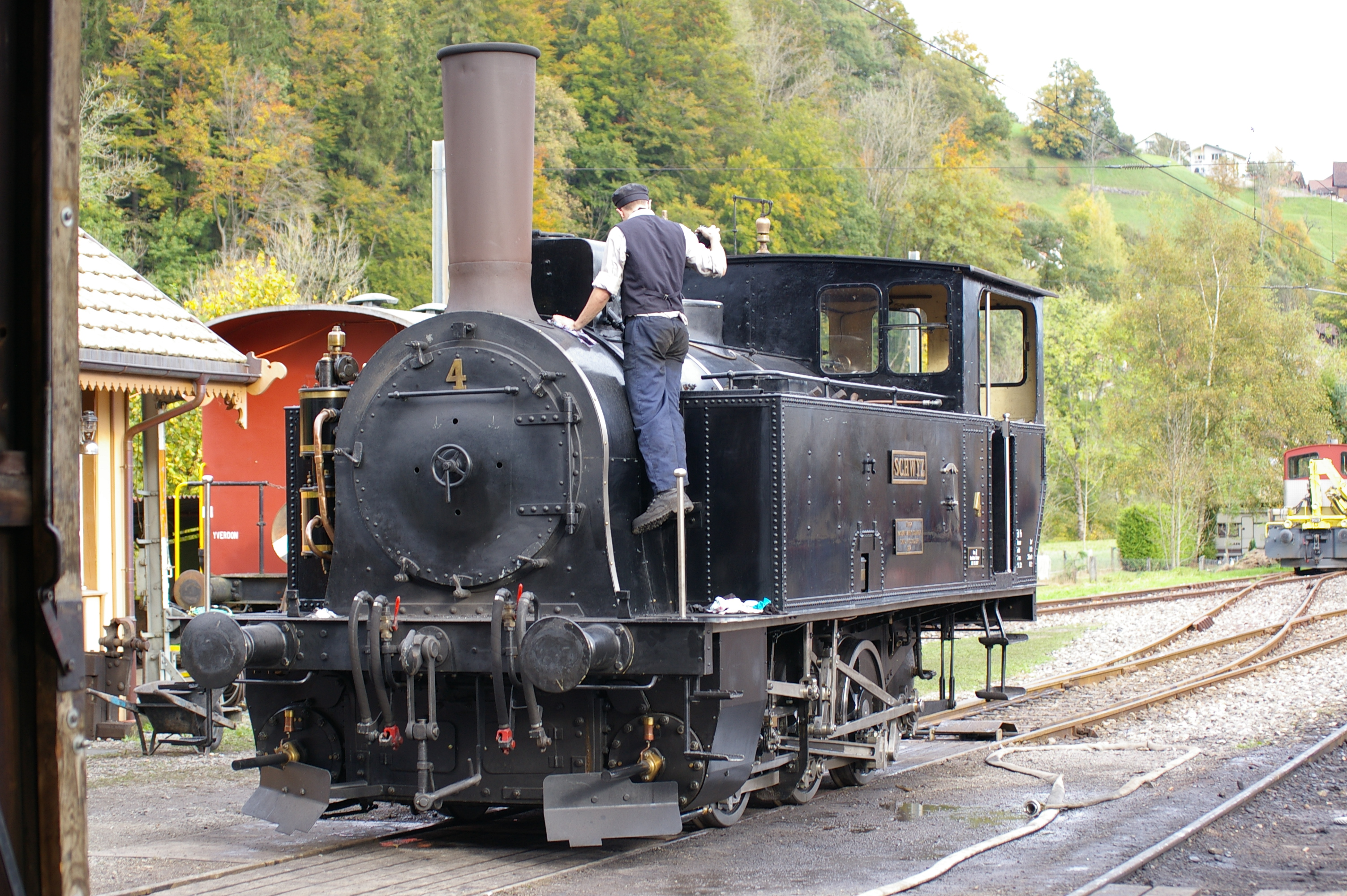 Dampflocomotive Ed 3/3 Nr. 4 Schwyz des Dampfbahn-Vereins Zürcher Oberland (ehmals als E 3/3 der Schweizeriſchen Südoſtbahn, gebaut 1887 in Emil Keſslers Machinen-Fabrique zů Eſslingen) vor dem Dépôt im Bahnhofe von Bauma.